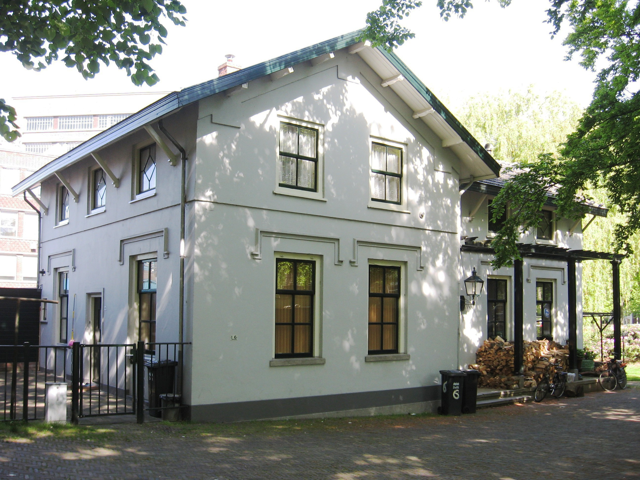 Delft - Dienstwoning begraafplaats (Kalverbos).jpg, rijksmonument